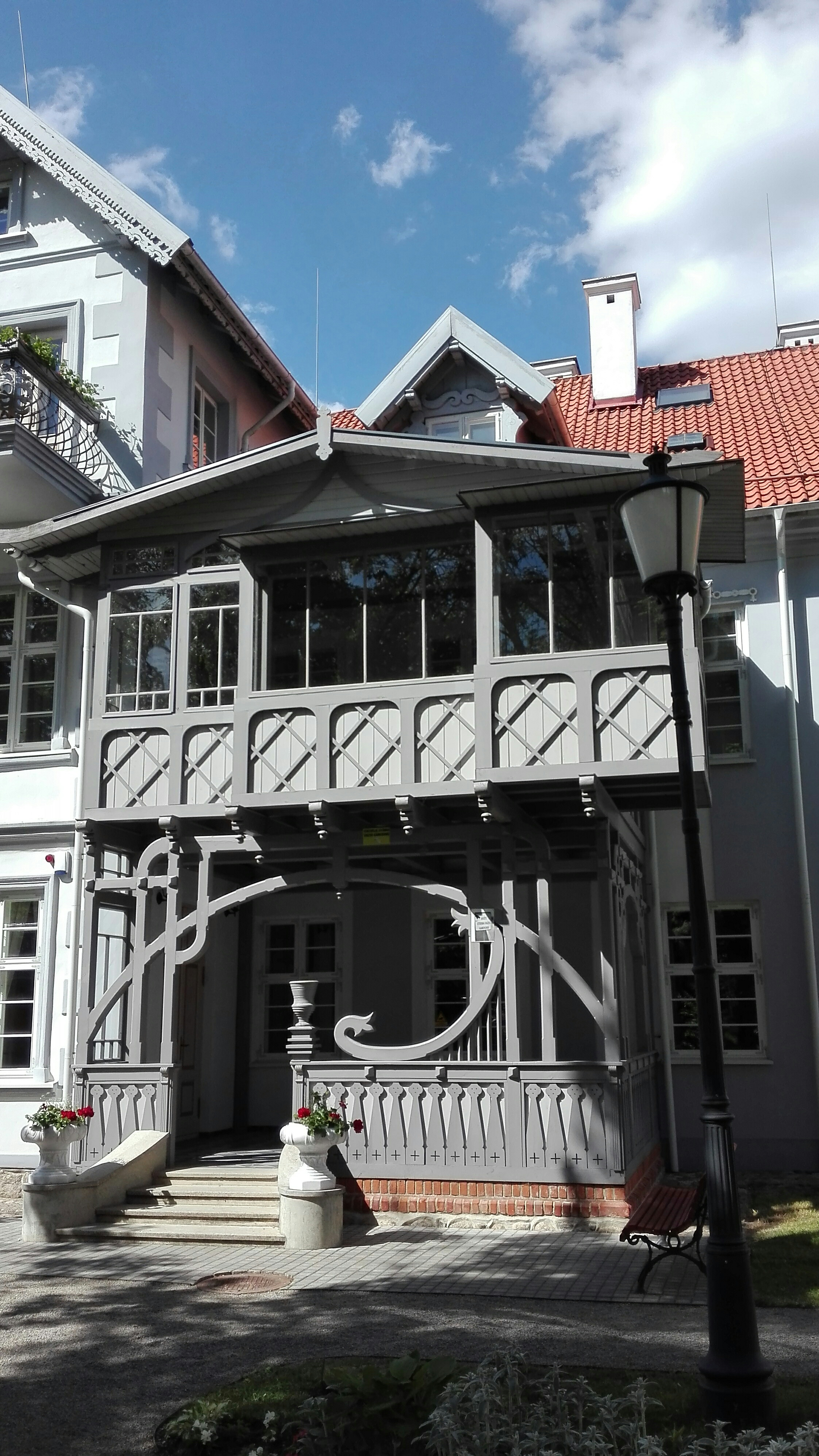 Hugo Šojaus dvaro įėjimas iš kiemo